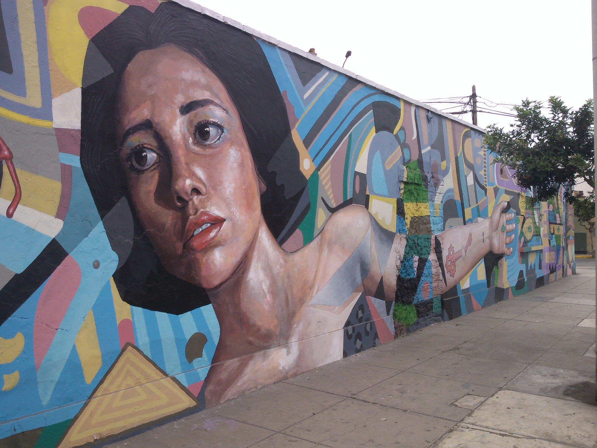 Graffiti en la Calle Hipólito Unanue, Miraflores, Lima, Perú.